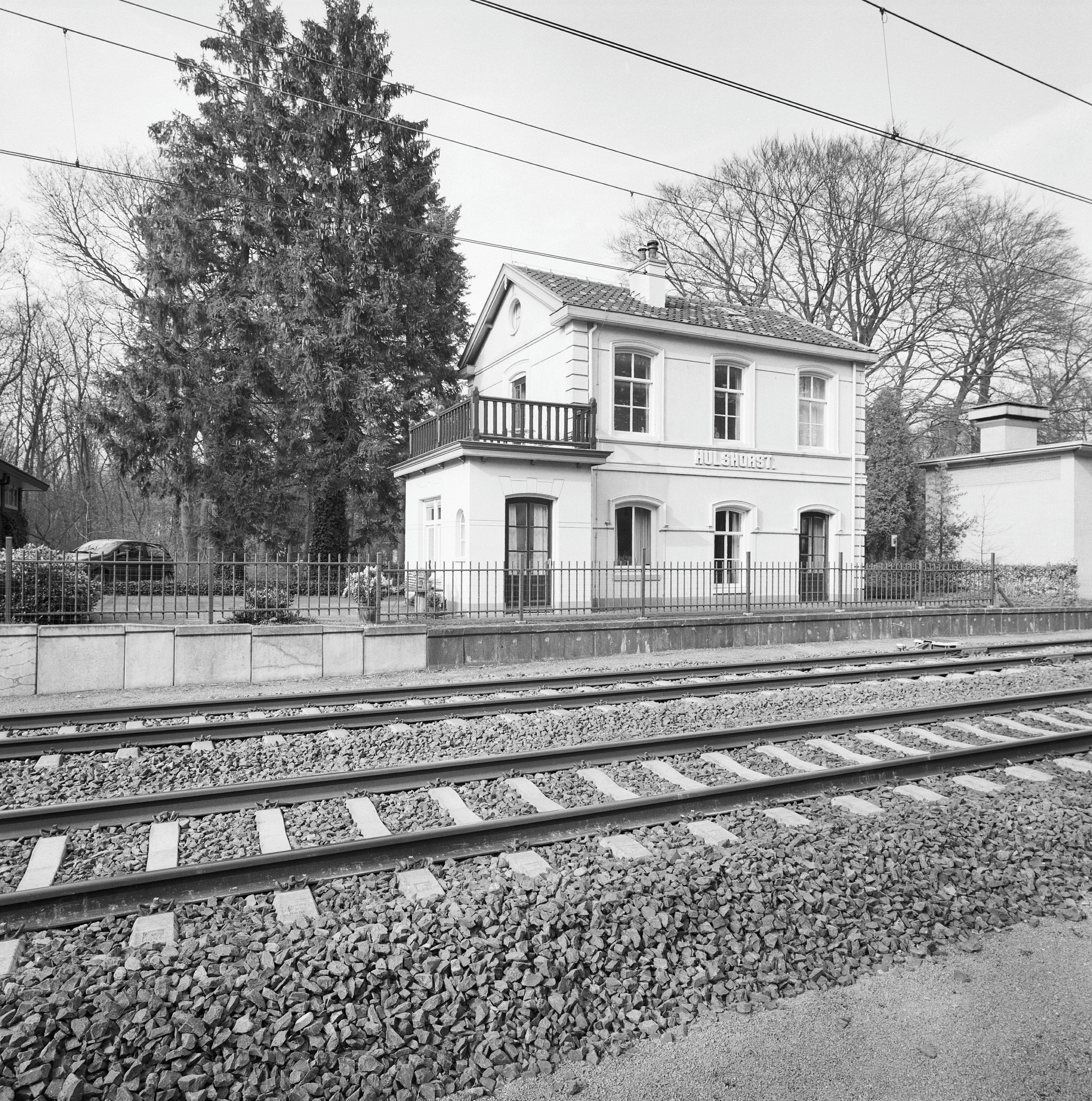 Voormalig station: Overzicht achtergevel aan de spoorzijde en rechter zijgevel (opmerking: Gefotografeerd voor Monumenten In Nederland Gelderland)